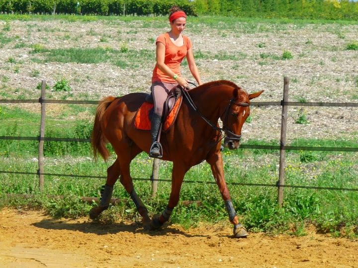 Romy des Dimes, jument trotteur français, propriété de Léa Laverny, travaillant sur le plat